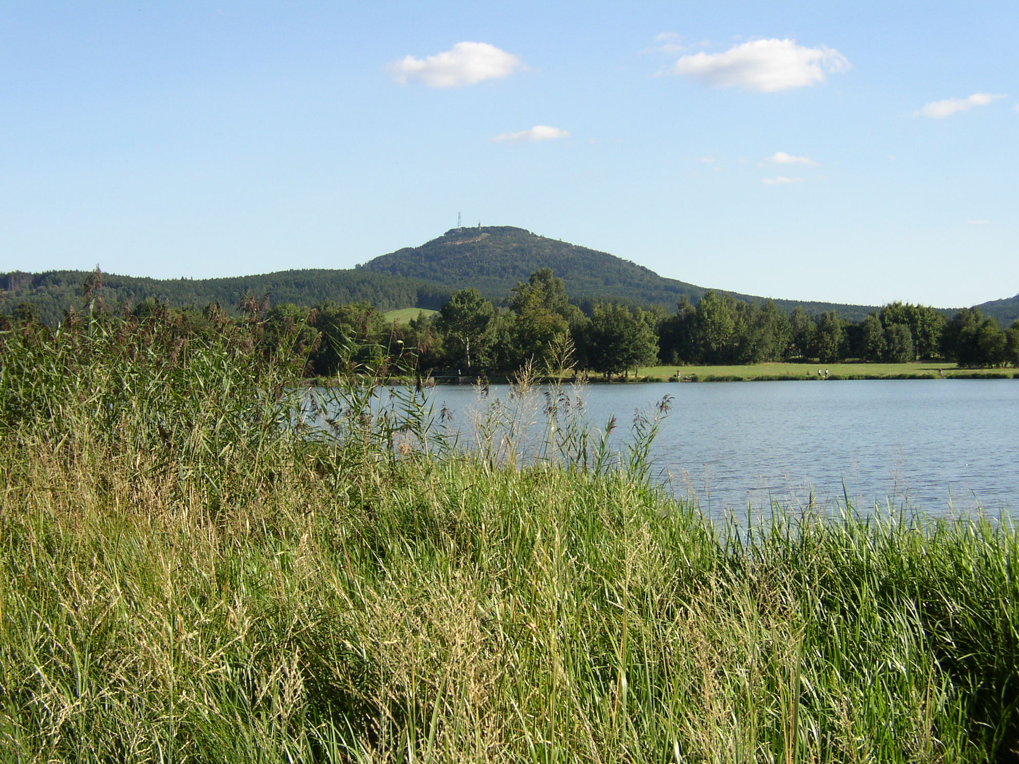 Velký Rybník, Rybniště, okres Děčín, Česká republika